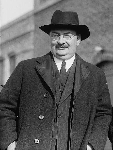 Сантери Нуортева и Л. Мартинс 10 января 1920 года